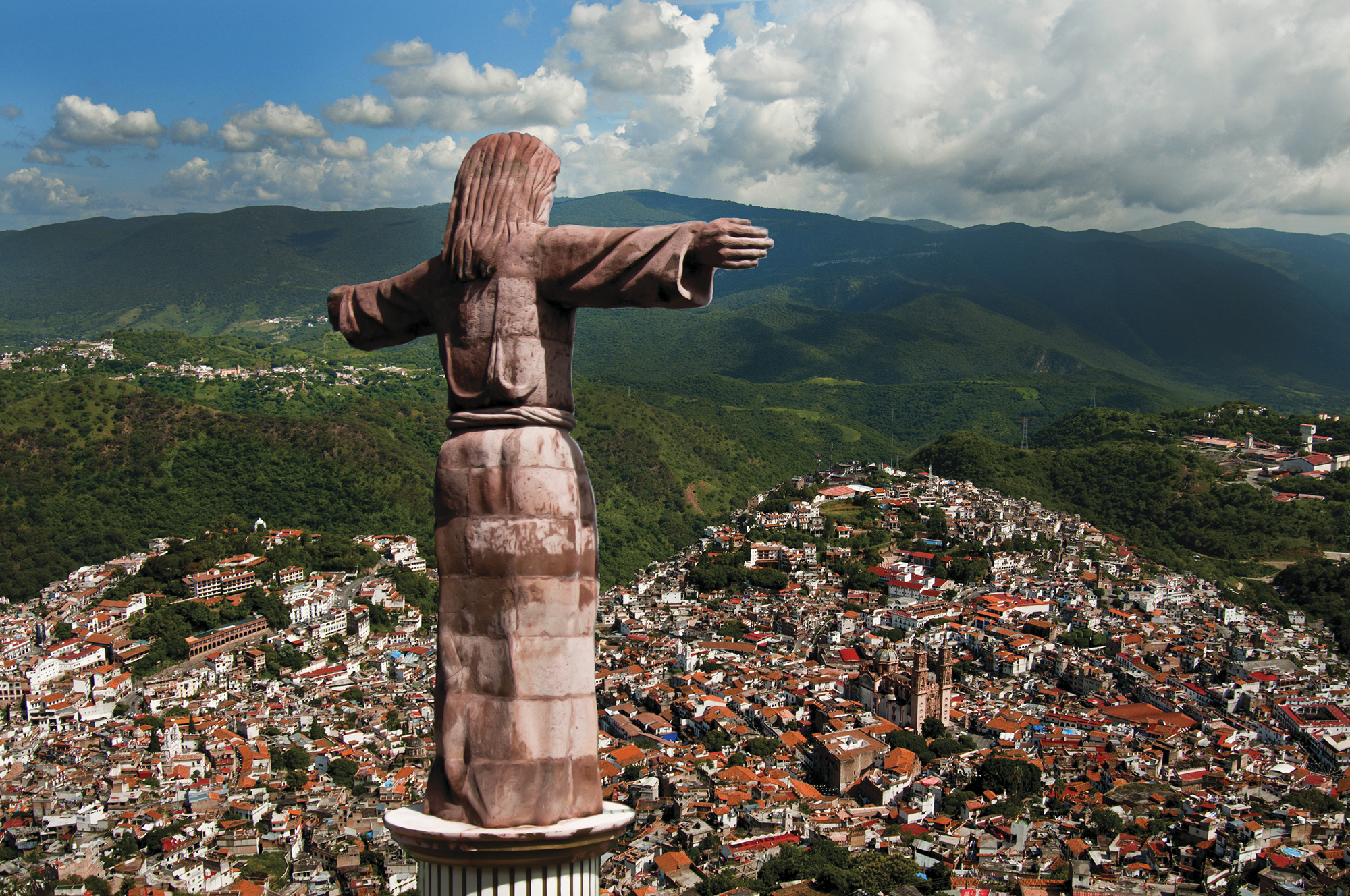 Cristo de Taxco de Alarcón, Guerrero